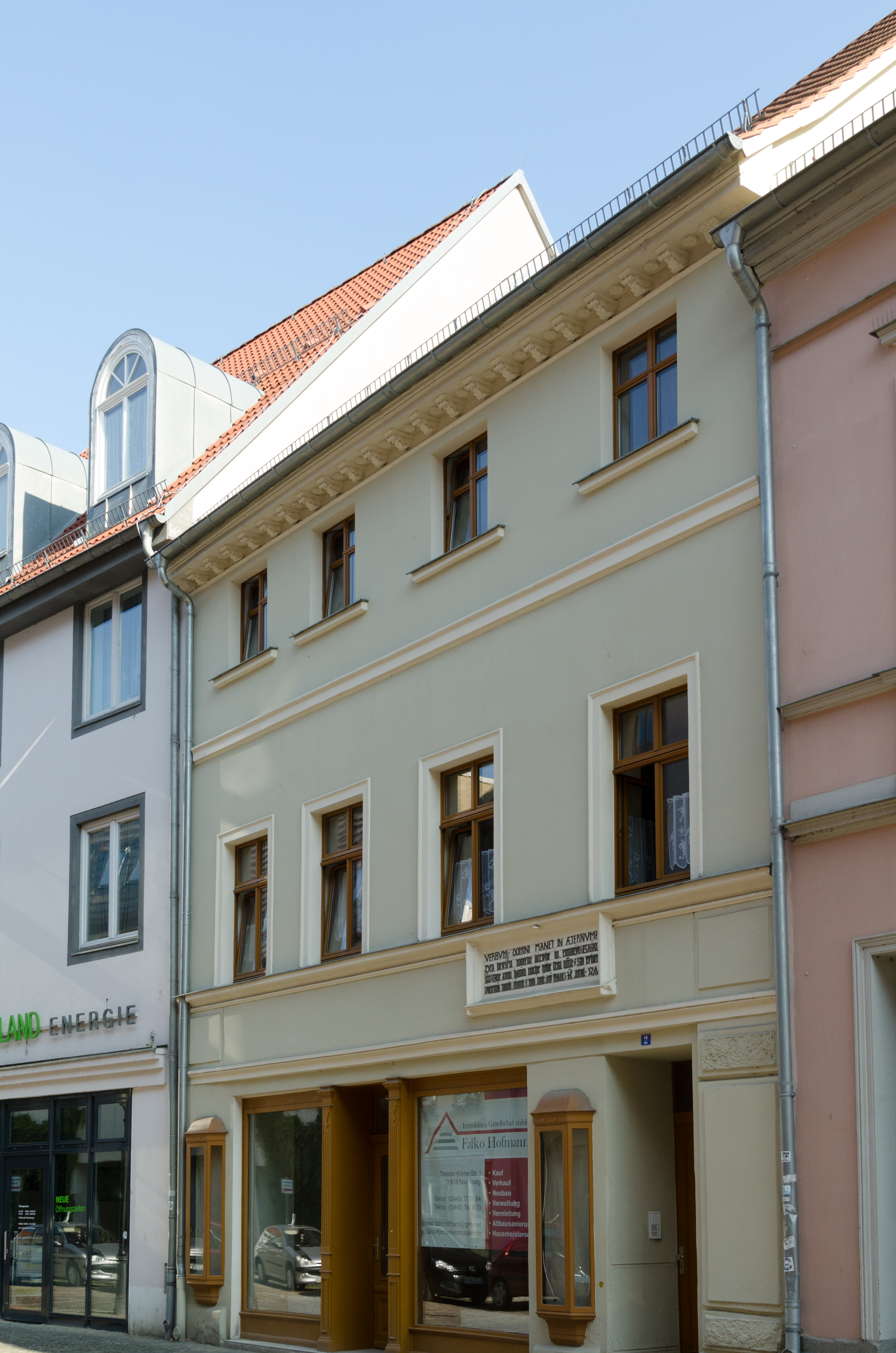 Naumburg, Marienstraße 2